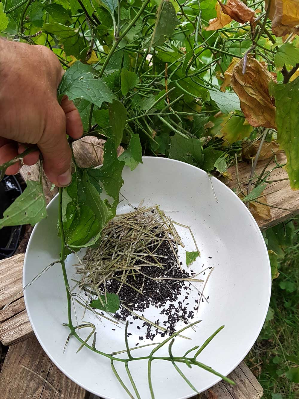 Schwarze Samen und grüne Schoten der Knoblauchsrauke (Alliaria petiolata). Samen der Knoblauchsrauke sind ab Anfang Juli erntereif, Freising, Bayern, Deutschland.